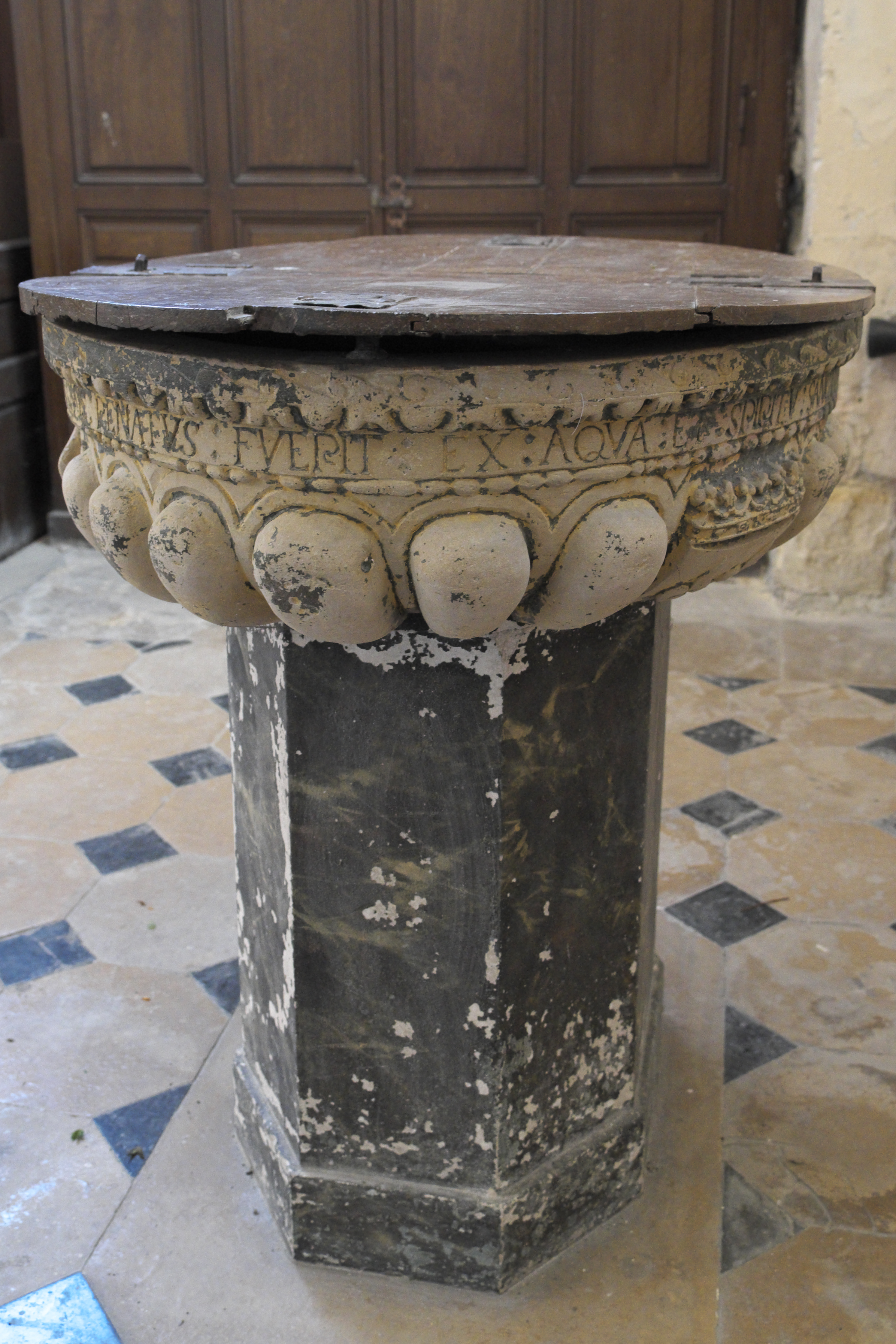 Katholische Kirche Sainte-Croix in Bray-sur-Seine im Département Seine-et-Marne (Region Île-de-France/Frankreich), Taufbecken